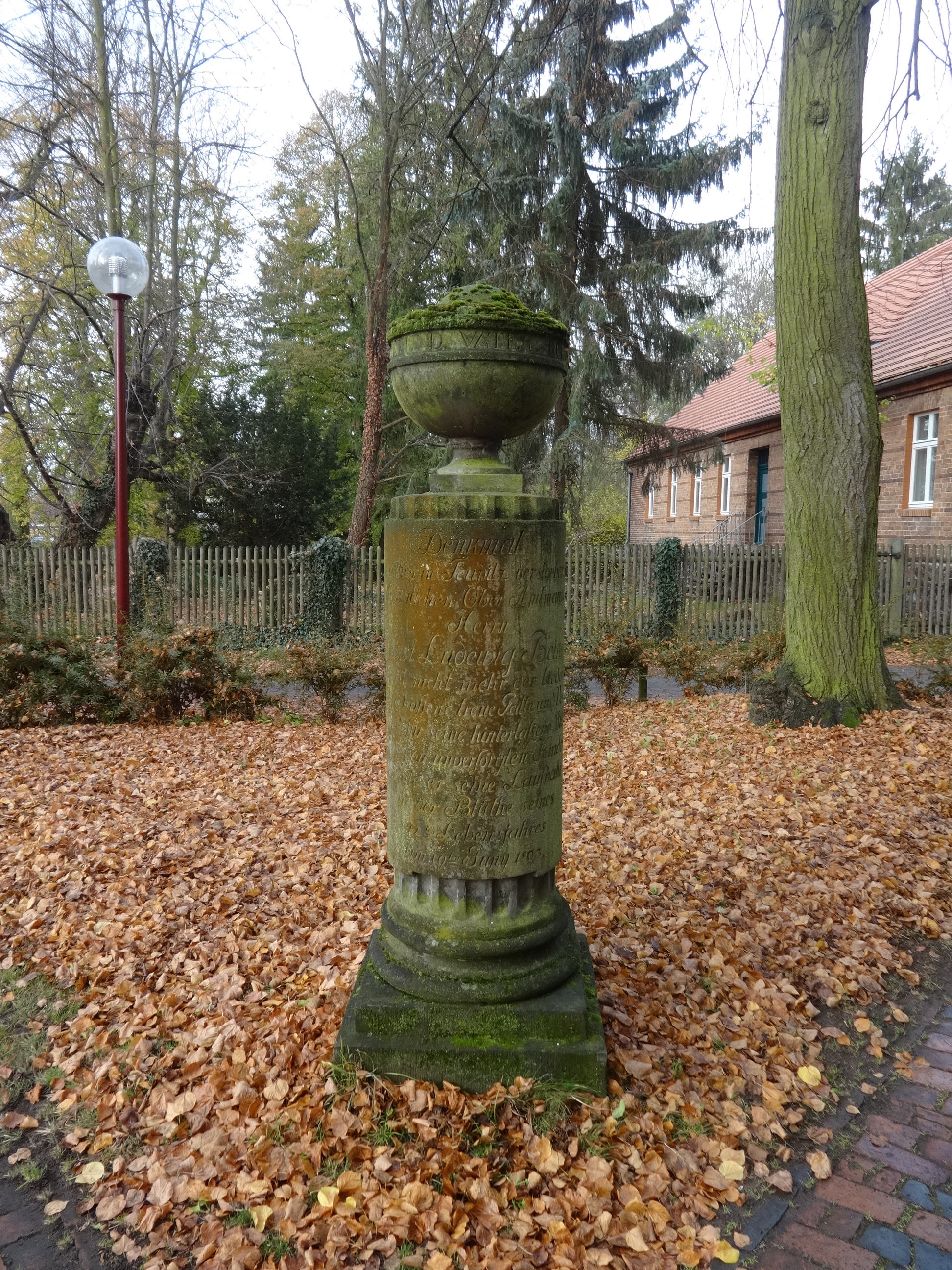 Die evangelische Heilig-Geist-Kirche ist ein Sakralbau aus dem späten 14. Jahrhundert. Sie befindet sich in Teupitz im Landkreis Dahme-Spreewald in Brandenburg. Im Innern befinden sich eine barocke Kanzel aus dem Jahr 1692 sowie eine Orgel von 1694.